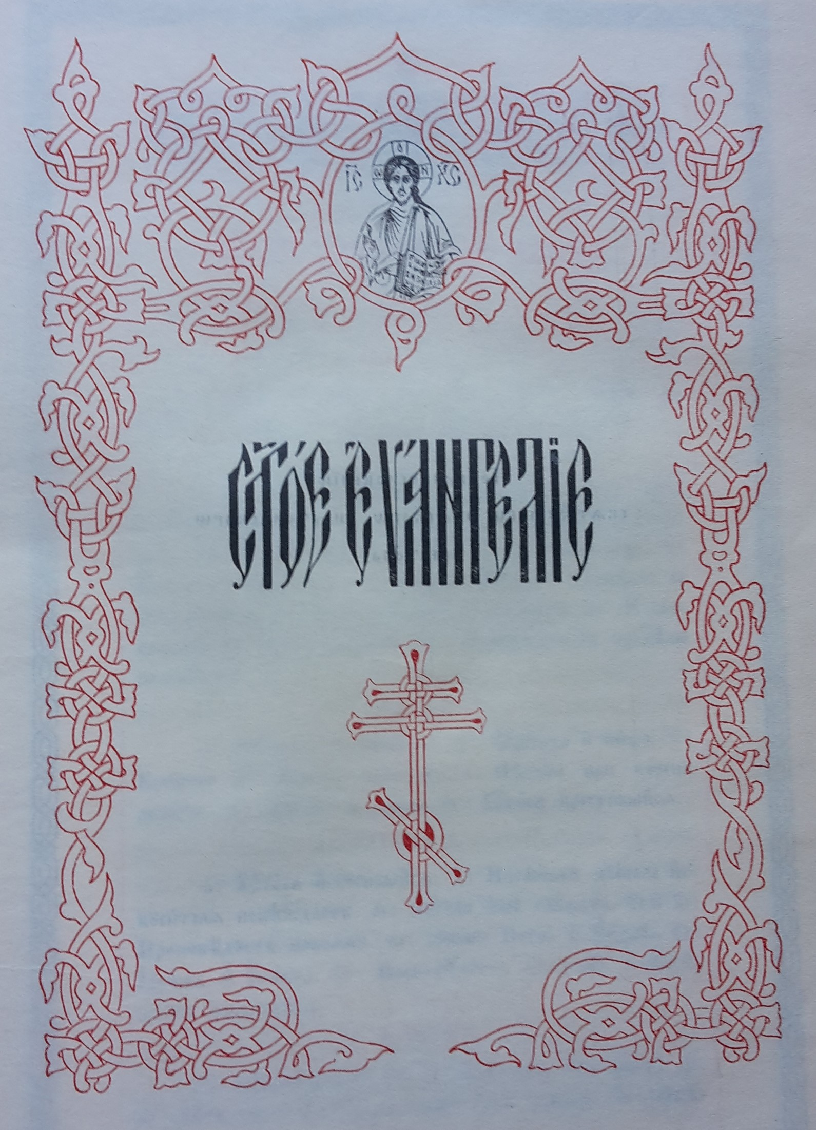 Образец кирилической печати, выполненной в типографии монастыря Гроттаферрата. Евангелие богослужебное, титульный лист